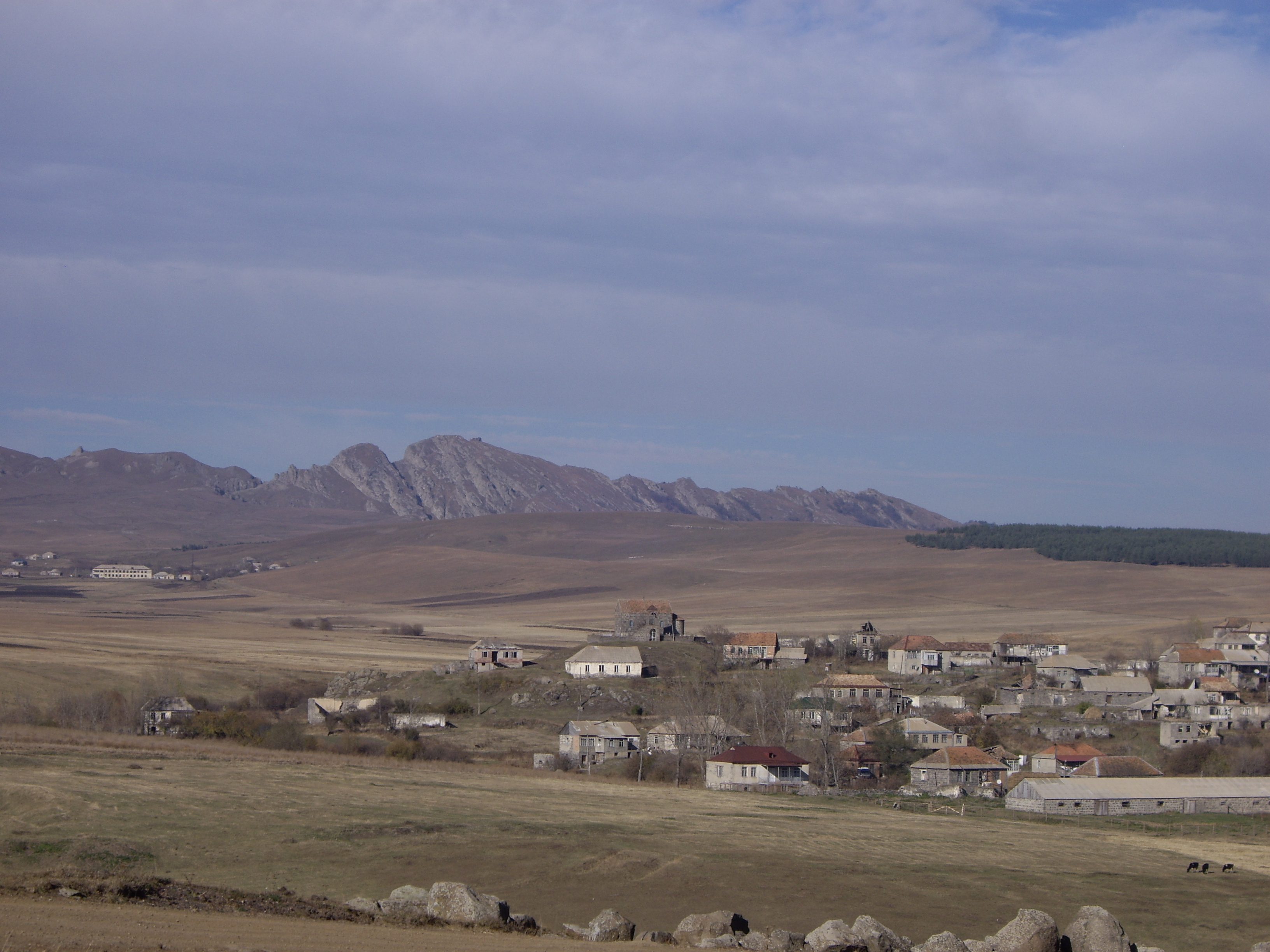 კლდეკარის ხედი შორიდან